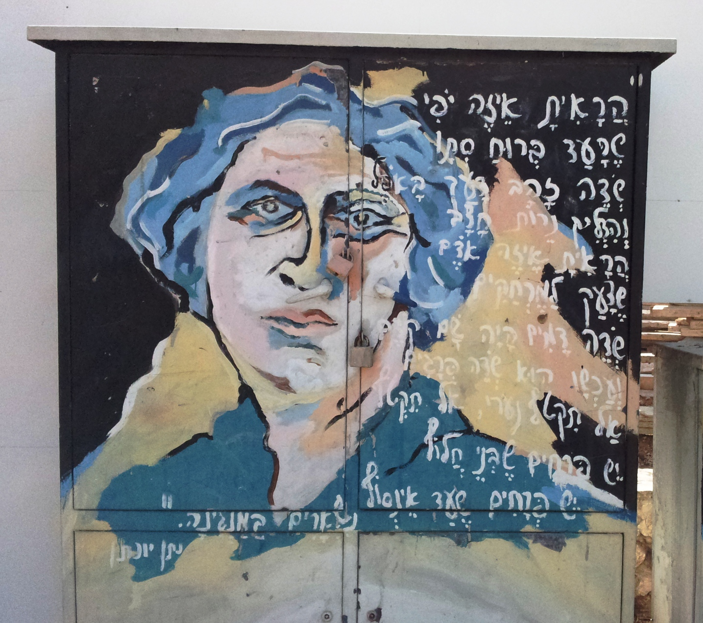 גרפיטי של אריאלה הראל עם מילות שירו של המשורר נתן יונתן : "יש פרחים" ברחוב החי"ל רעננה